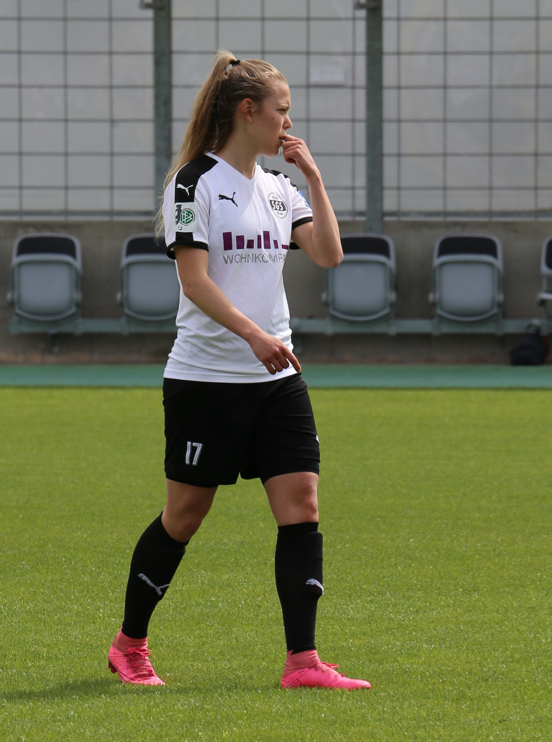 Margarita Gidion (SGS Essen) beim Frauen-Bundesliga-Spiel FC Bayern München gegen SGS Essen am 21. Mai 2017 im Stadion an der Grünwalder Straße (Ergebnis war 2:0)